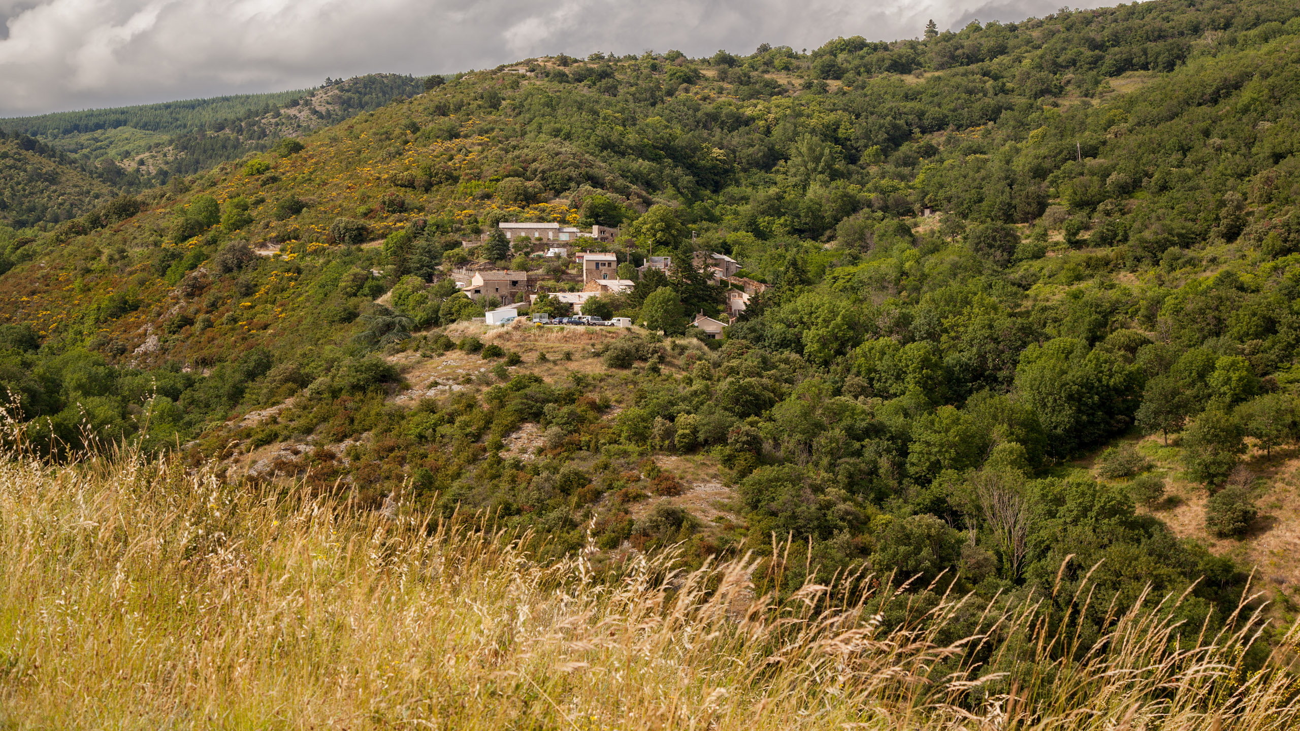 Vue lointaine